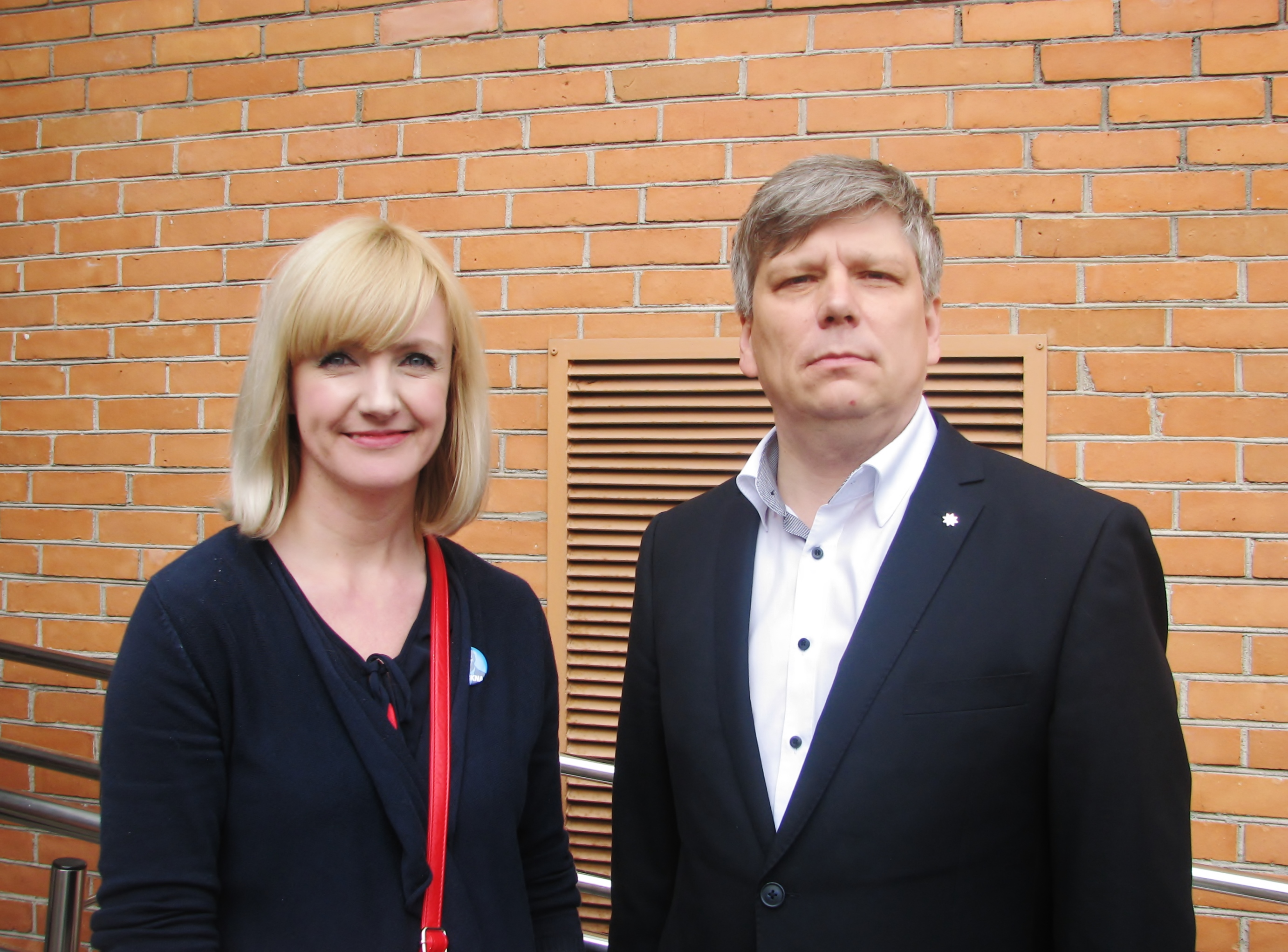 Evelin Samuel ja Siim-Valmar Kiisler IRLi suurkogul